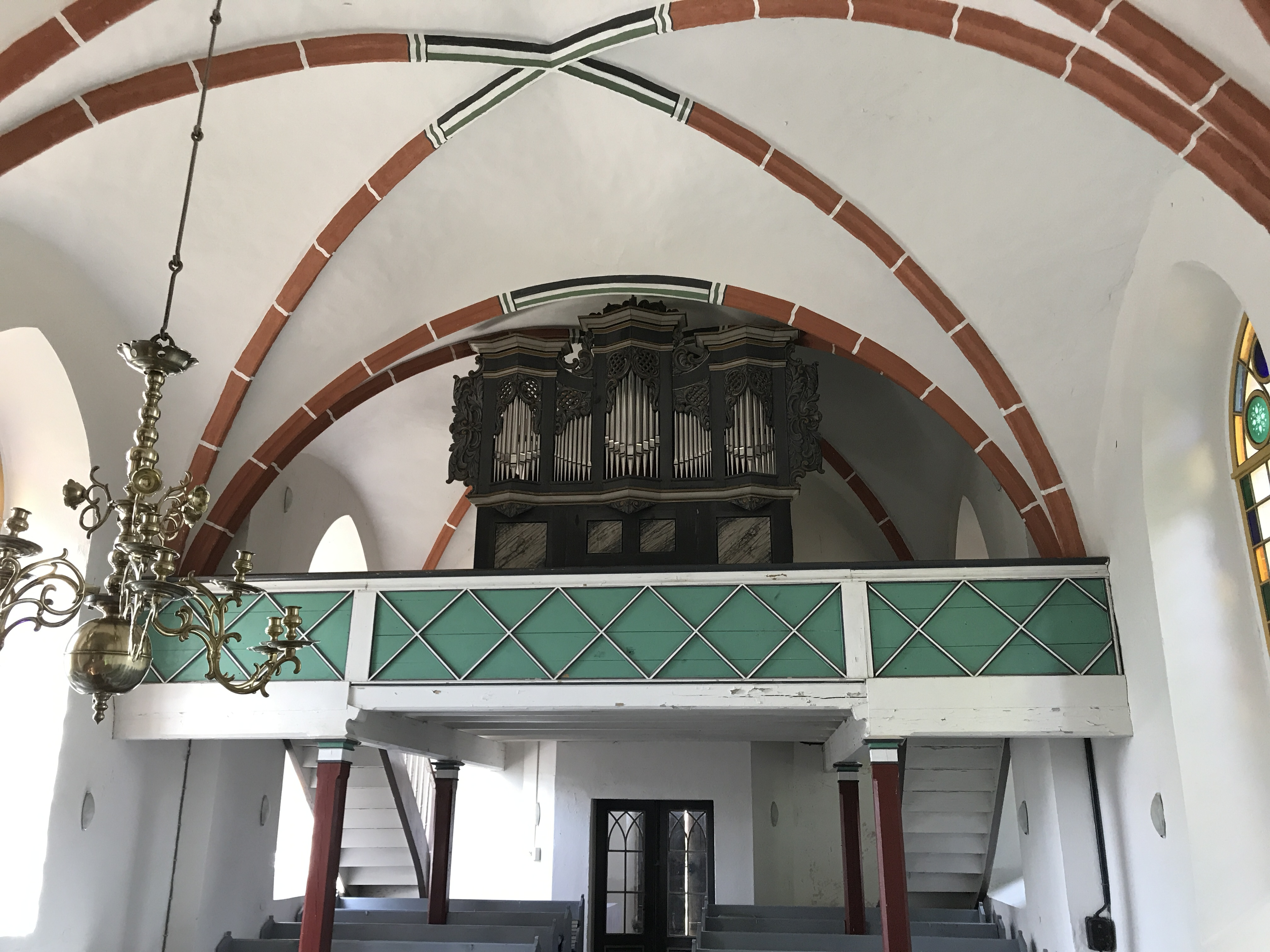 Die Dorfkirche Bochow ist eine gotische Feldsteinkirche in Bochow, einem Ortsteil der Gemeinde Niedergörsdorf in Brandenburg. Im Innern steht unter anderem ein Altaraufsatz von Gottfried Patzsch(en) aus dem Jahr 1701.